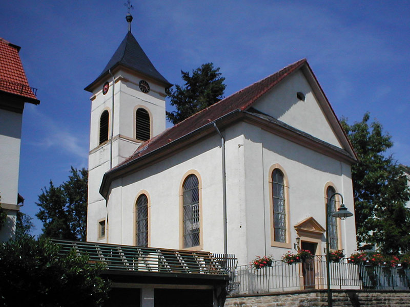 Evangelische Kirche in Sinsheim-Hasselbach, erbaut 1807